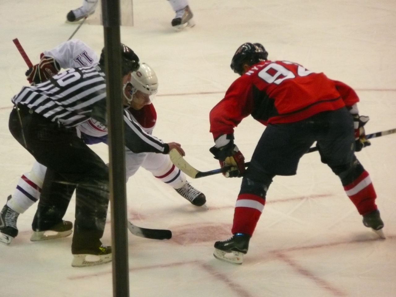 Michael Nylander